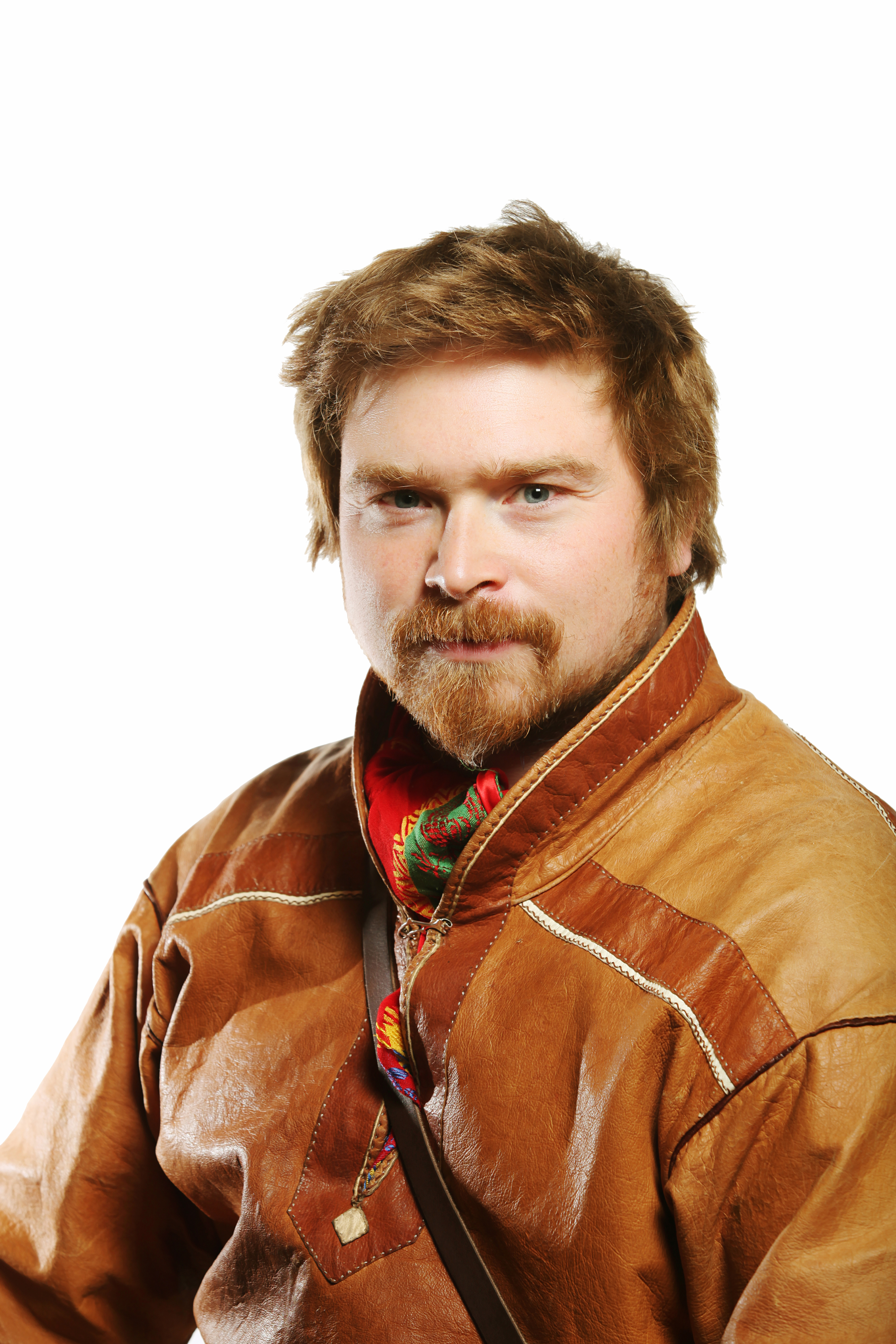 Medlem av plan- og finanskomitéen. Parlamentarisk nestleder for NSR. Foto: Kenneth Hætta / Sametinget.